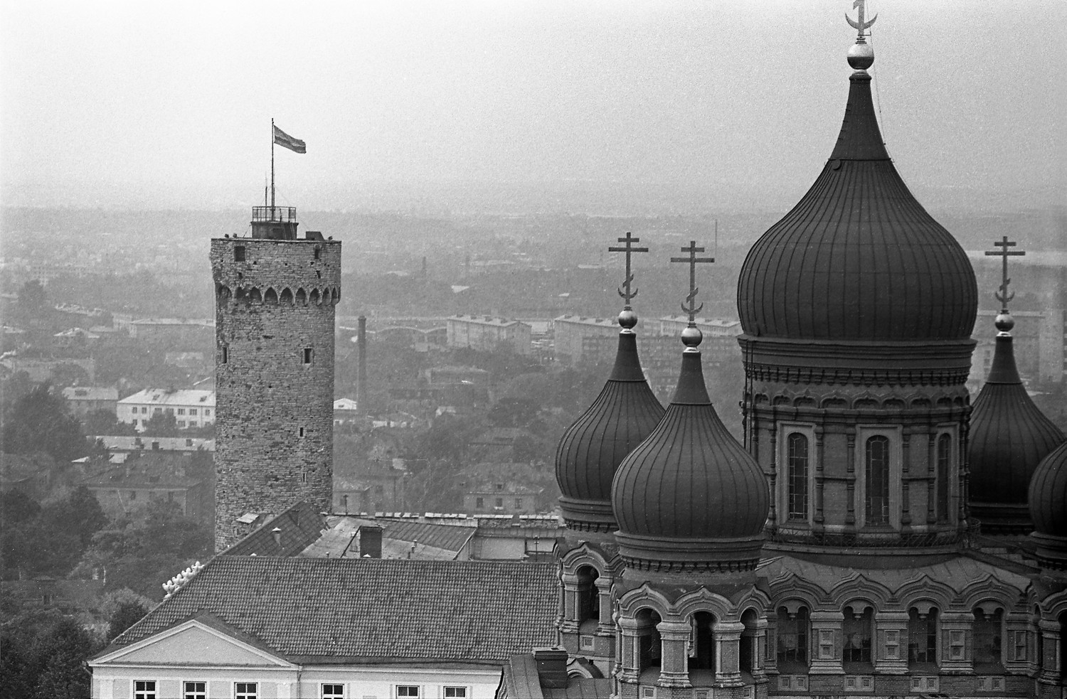 Pikk Hermann ja Aleksander Nevski katedraal Niguliste kiriku tornist 1974